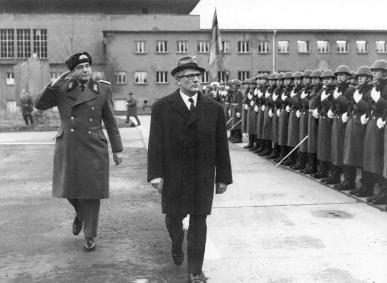 NVA-Truppenbesuch Erich Honecker Erich Honecker zu Besuch einer Einheit der NVA Abgebildete Personen: Honecker, Erich: Staatsratsvorsitzender, Generalsekretär des ZK der SED, DDR (GND 118553399) Hoffmann, Heinz: Minister für Nationale Verteidigung, Mitglied des ZK der SED, DDR (GND 118552503)